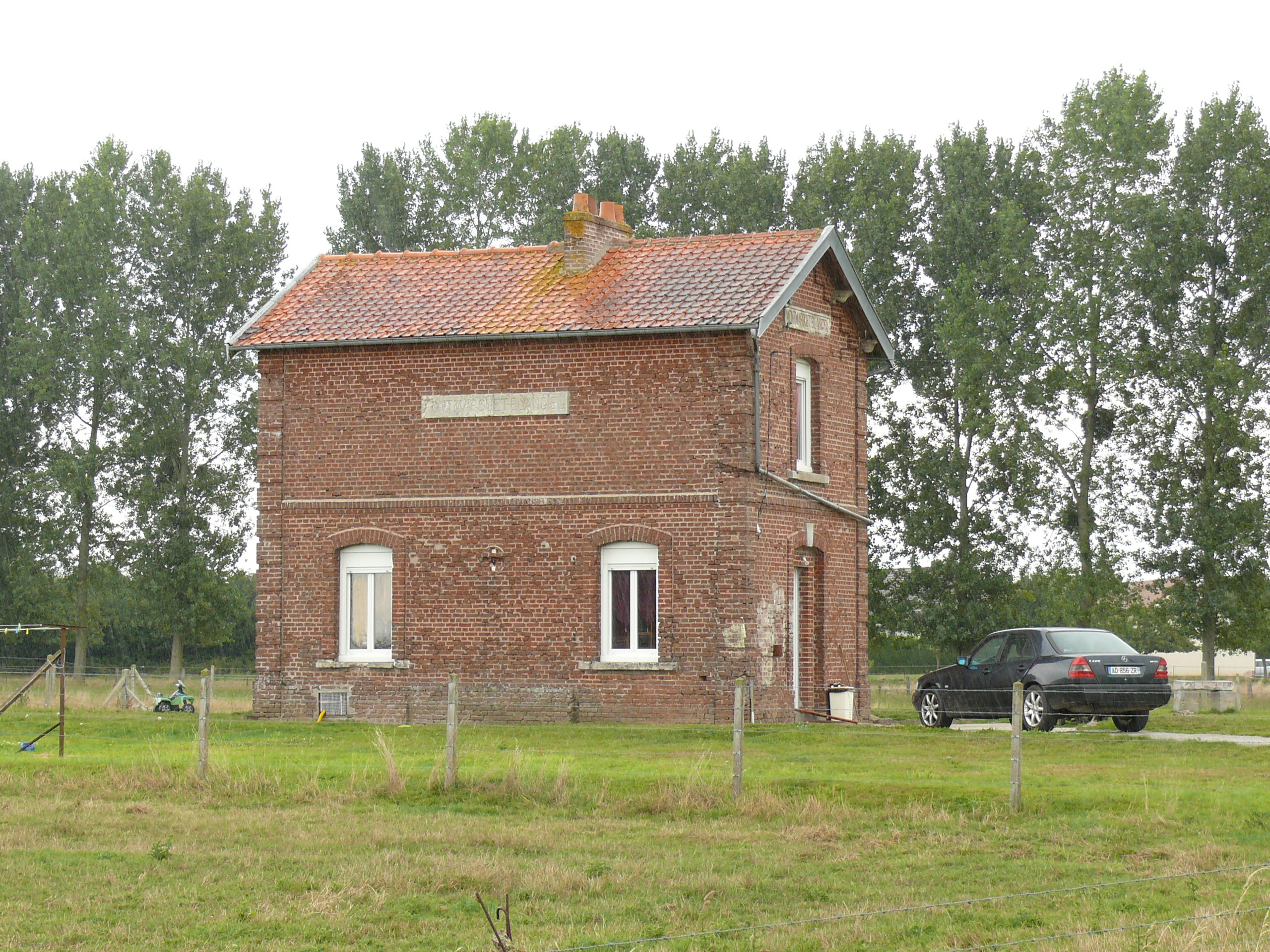 Ancienne gare de Montmarquet - Blangiel (Commune de Lafresguimont-Saint-Martin - Somme) des Chemins de fer départementaux de la Somme